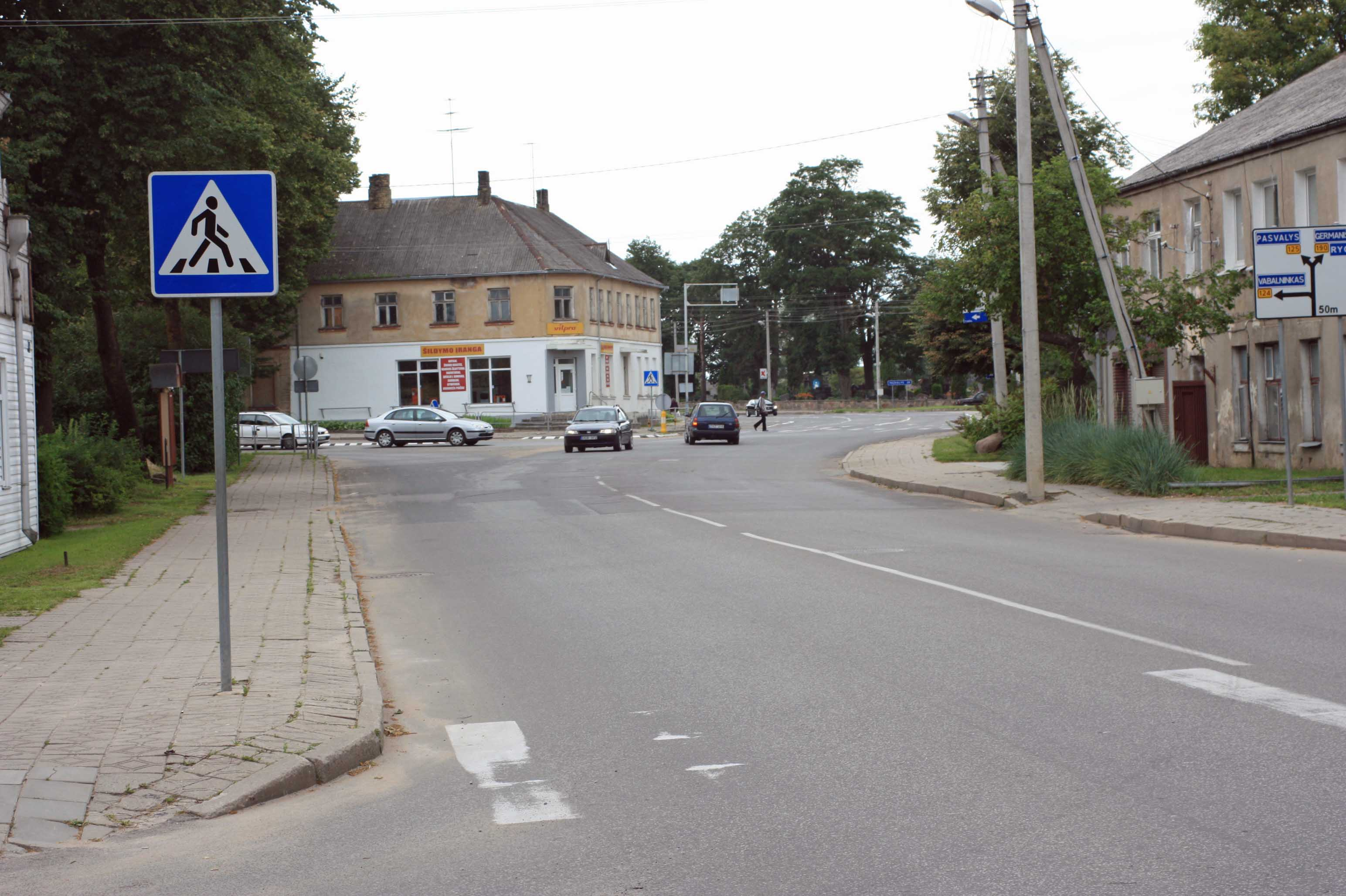 Biržai, buvęs "Muravankoje" Arvydo Fišerio saldainių fabriko "Laimutė" pastatas. Laikoma, kad už jo prasidėdavo Biržų kaimas.